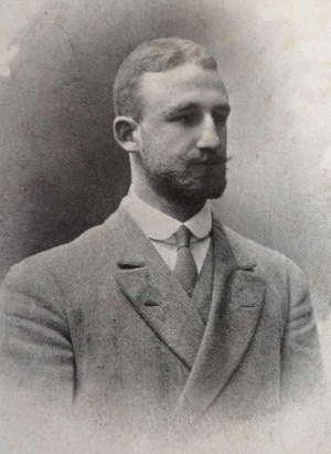 Il calciatore del Genoa, militare e ingegnere Luigi Ferraris in abiti civili.